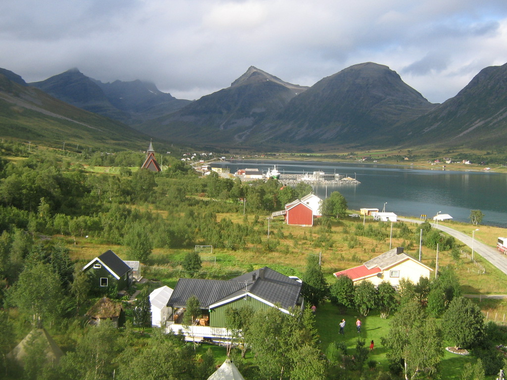 Del av Arnøyhamn